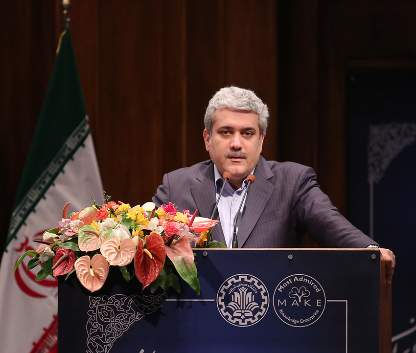 سورنا ستاری معاون علمی و فناوری رییس جمهور